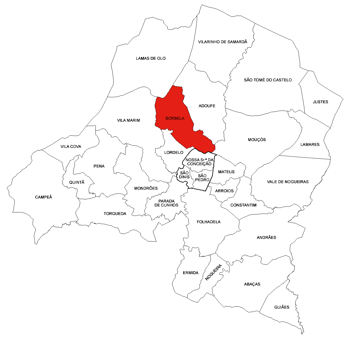 Freguesia de Borbela (concelho de Vila Real)